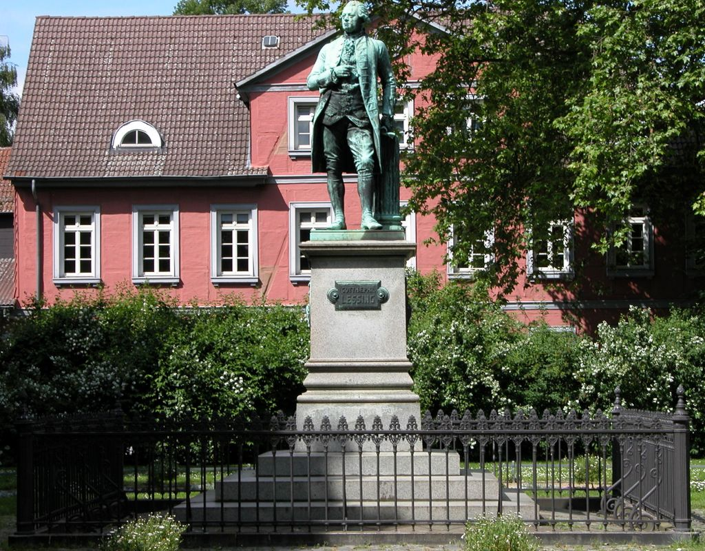 Braunschweig: Lessing-Denkmal auf dem Lessing-Platz